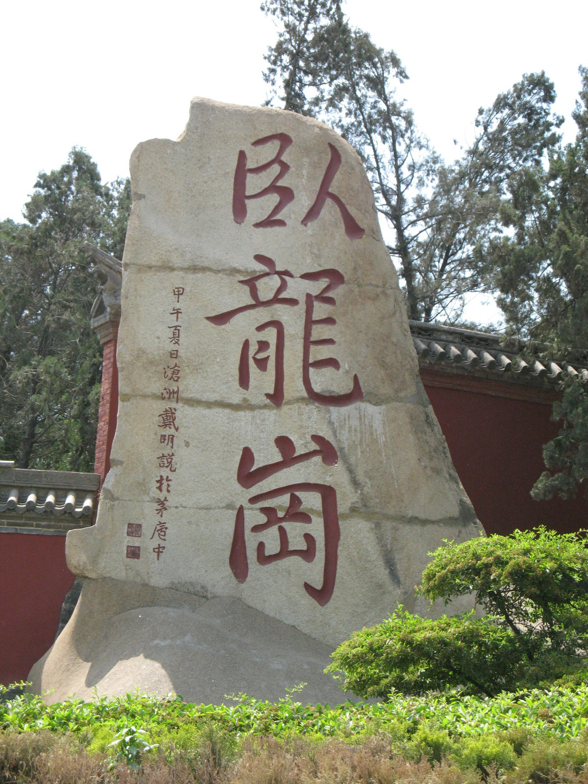 Nanyang Memorial Temple to Wuhou 河南南阳武侯祠